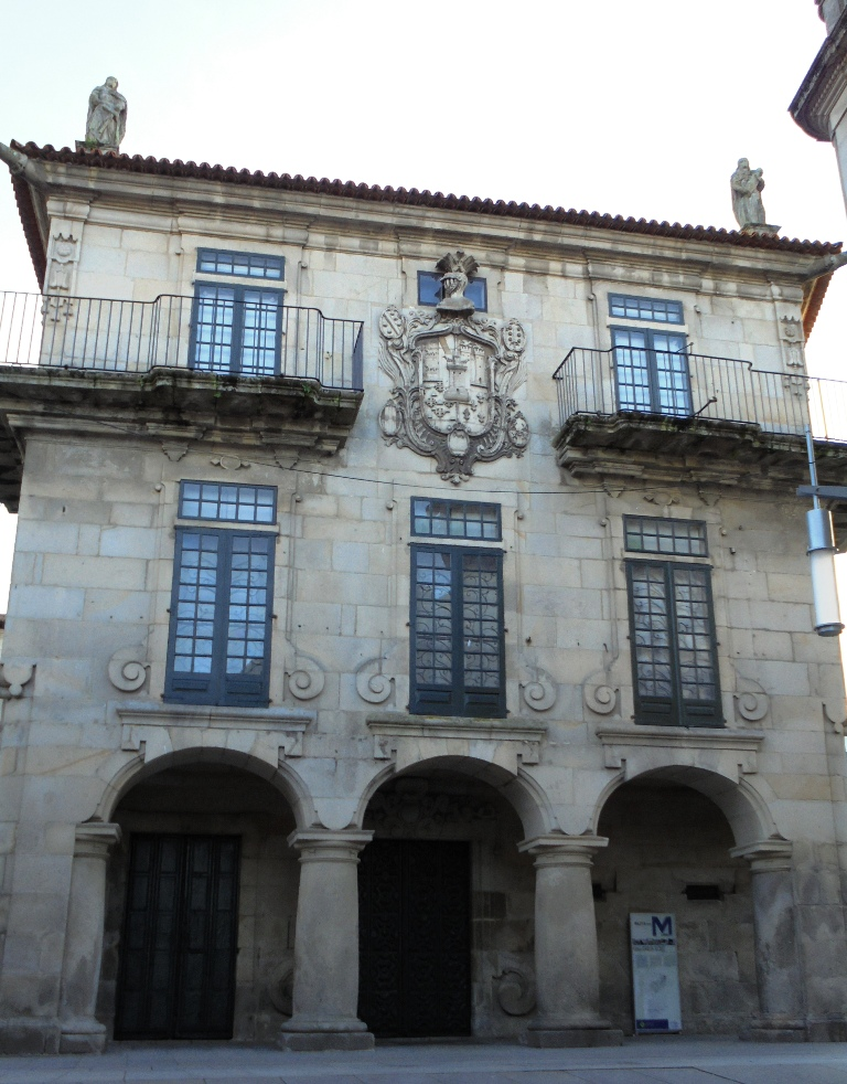 Palacio barroco de García Flórez